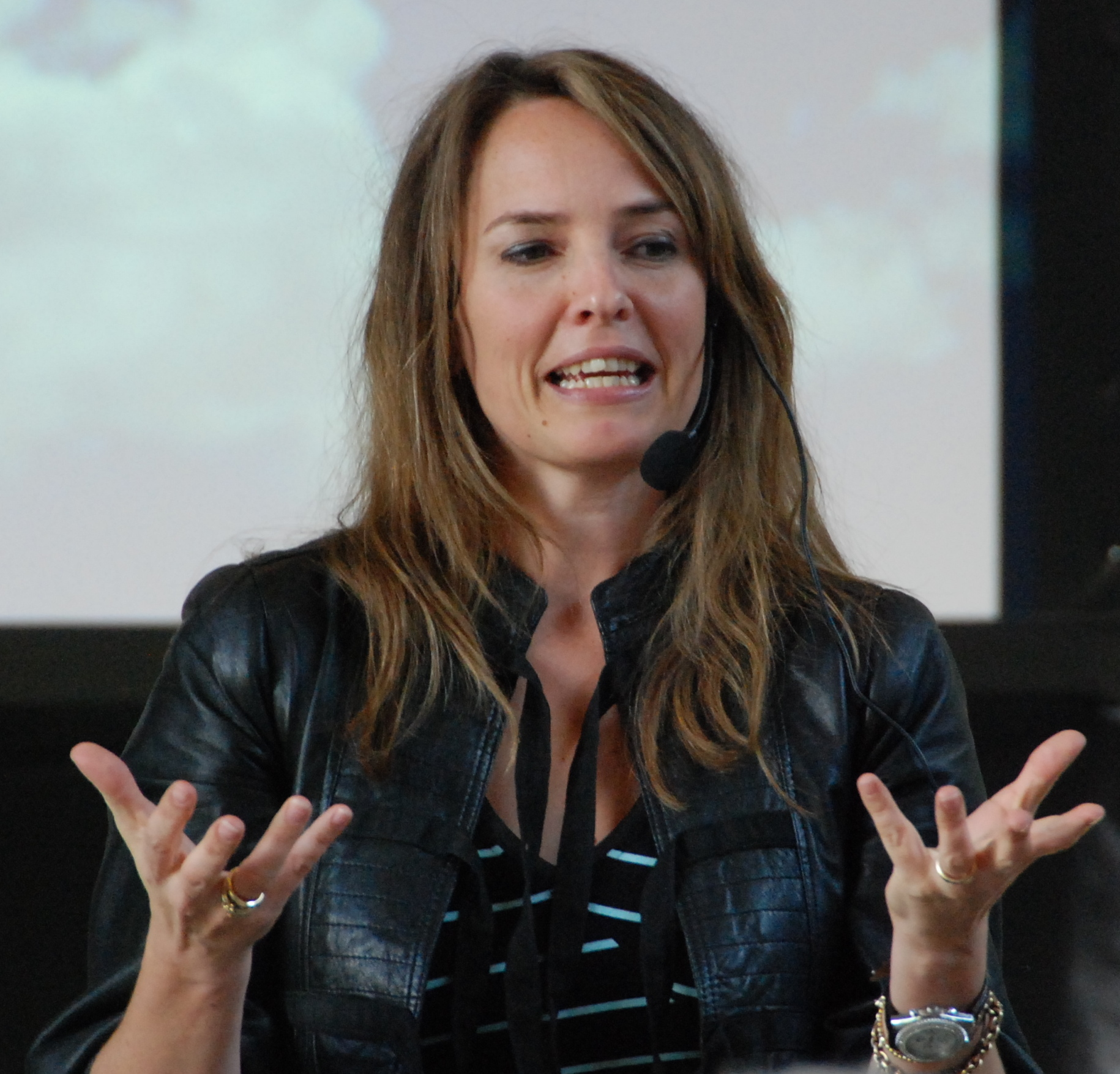 Brand turnaround: Anne Skare Nielsen